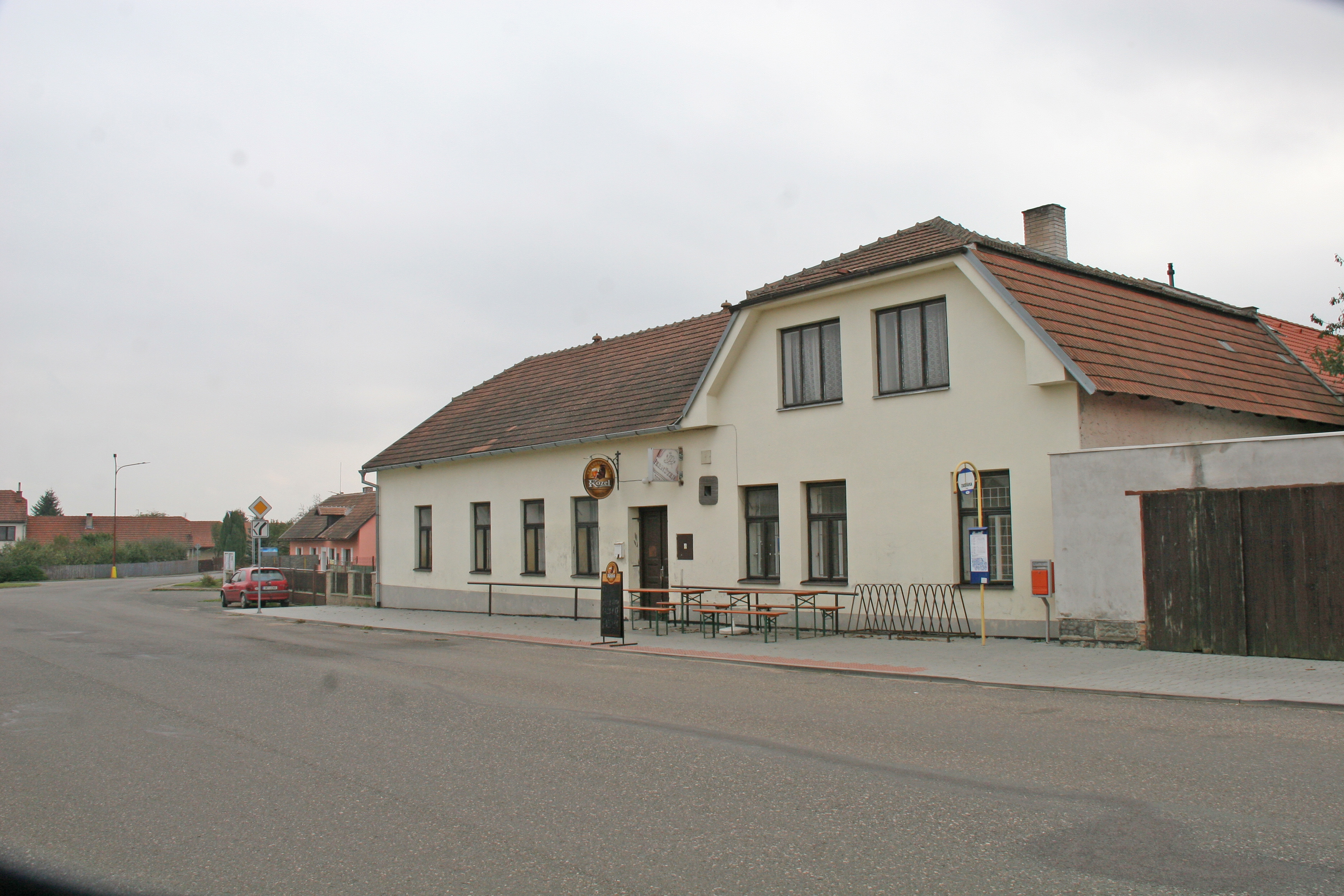 Tetov hostinec